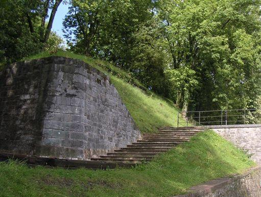 Détail des remparts de Maubeuge